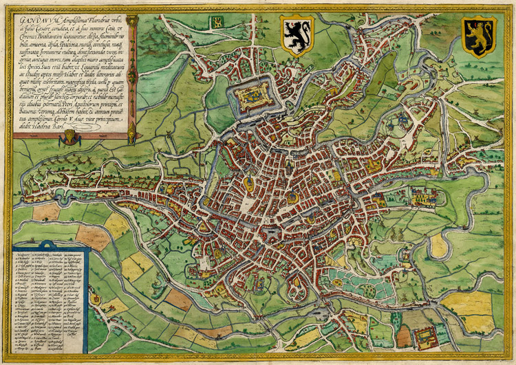 Gandavum, Amplissima Flandriae Urbs, ... - Braun & Hogenberg ,1576. Beschreibung und Contrafactur der Vornembster Stät der Welt. Liber Primus. Köln, 1572. (Koeman, B&H7)